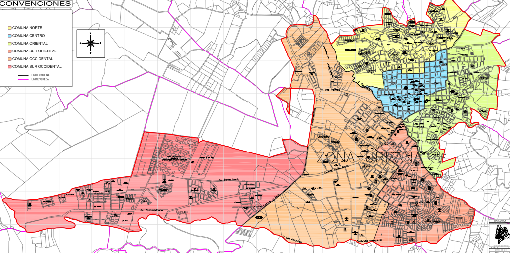 Mapa Comunas de Fusagasugá Cundinamarca Colombia